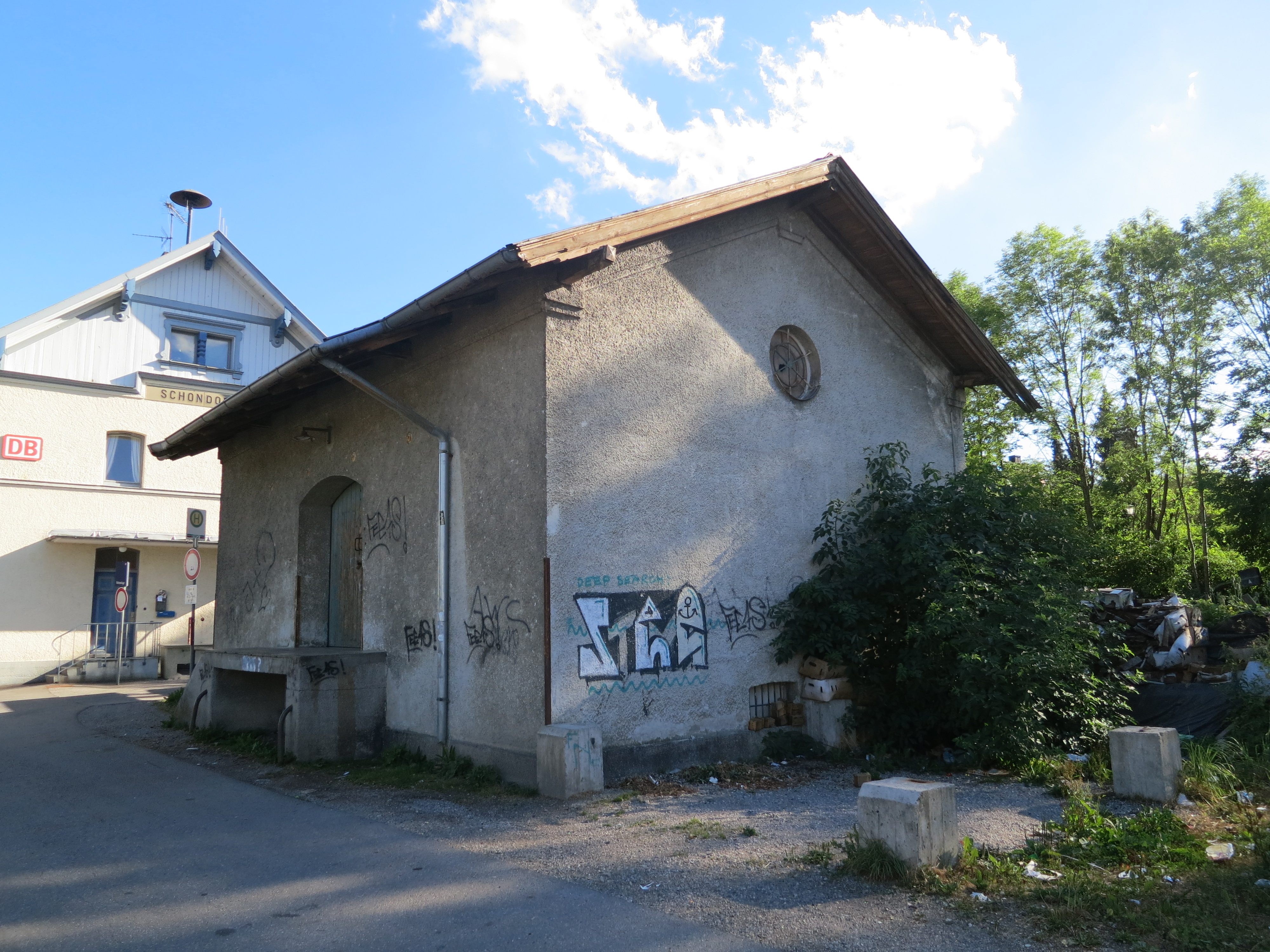 Denkmalgeschützter ehemaliger Güterschuppen des Bahnhofs Schondorf (Bay) von der Straßenseite, im Hintergrund das Empfangsgebäude